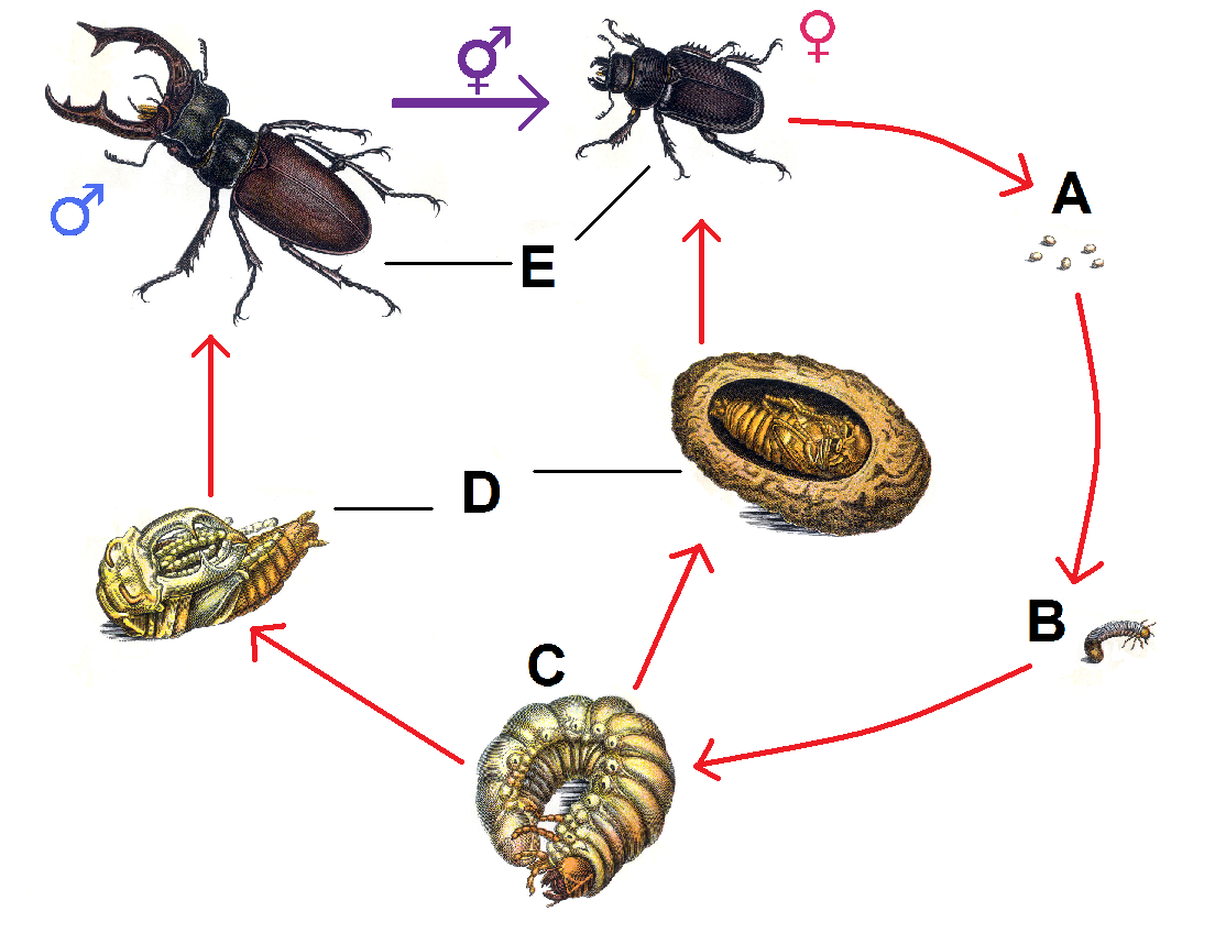 Lucanus cervus